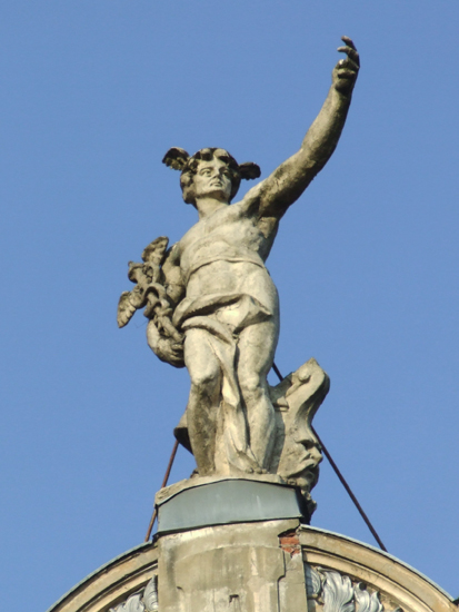 Merkur, bog trgovine na secesijski stavbi Centromerkur, Ljubljana